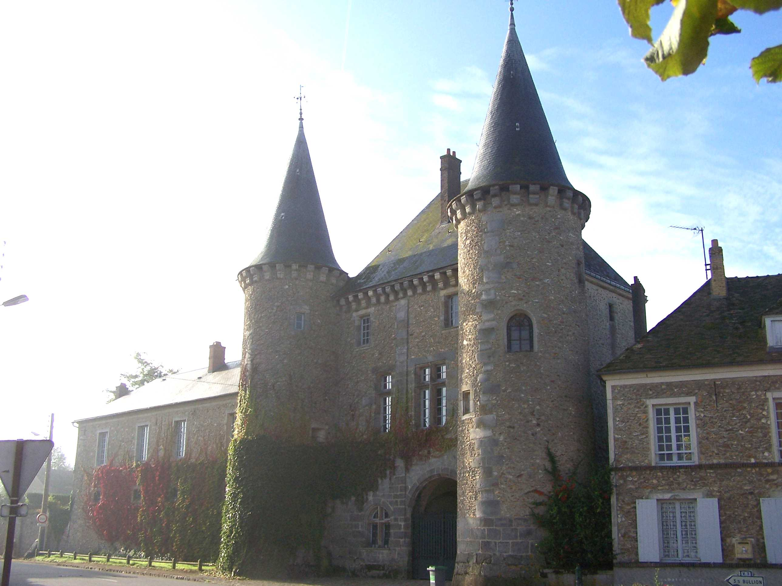 Château des Bordes à La-Celle-les-Bordes (Yvelines, France)